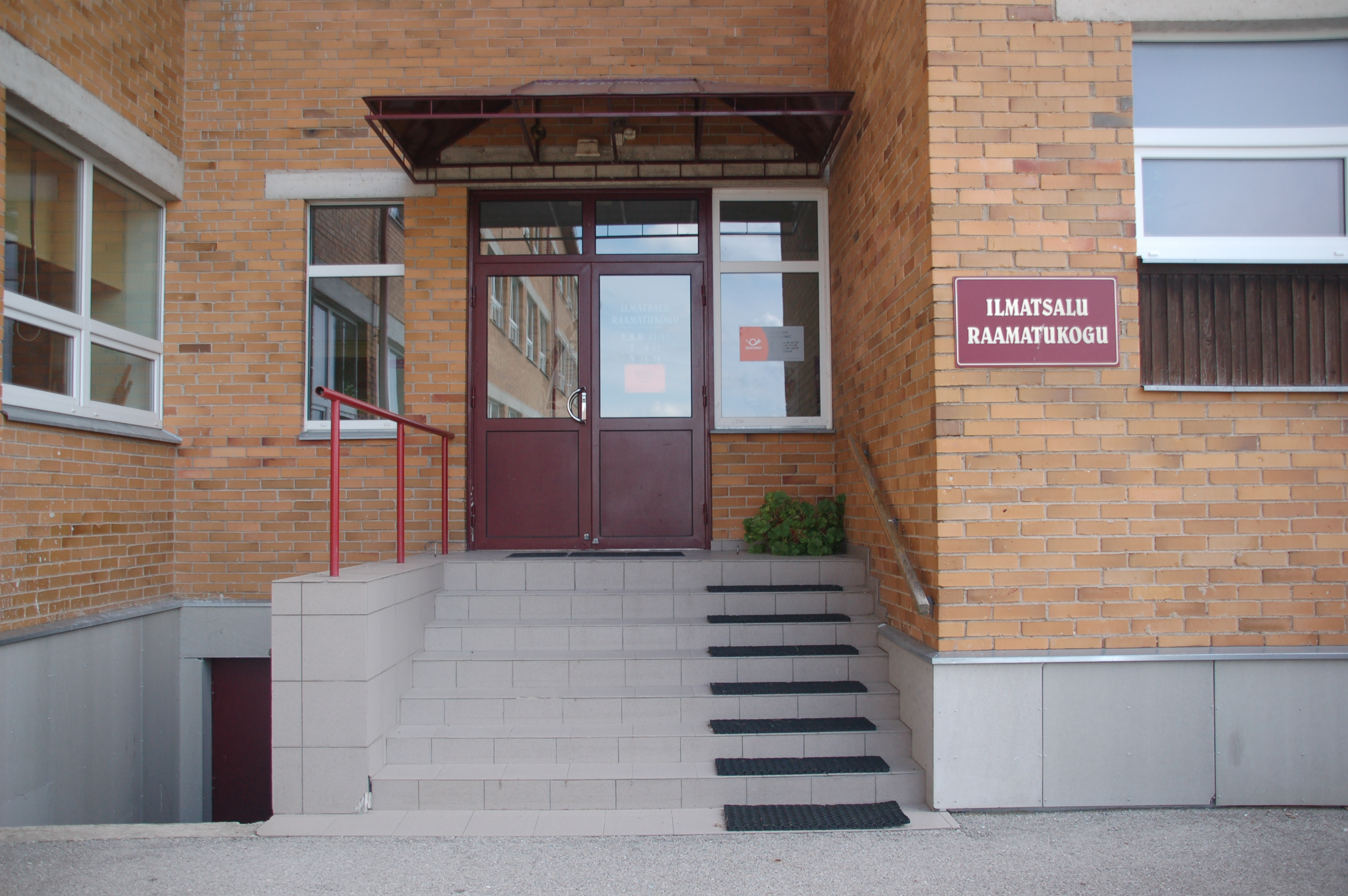 Ilmatsalu raamatukogu sissekäik (2015)